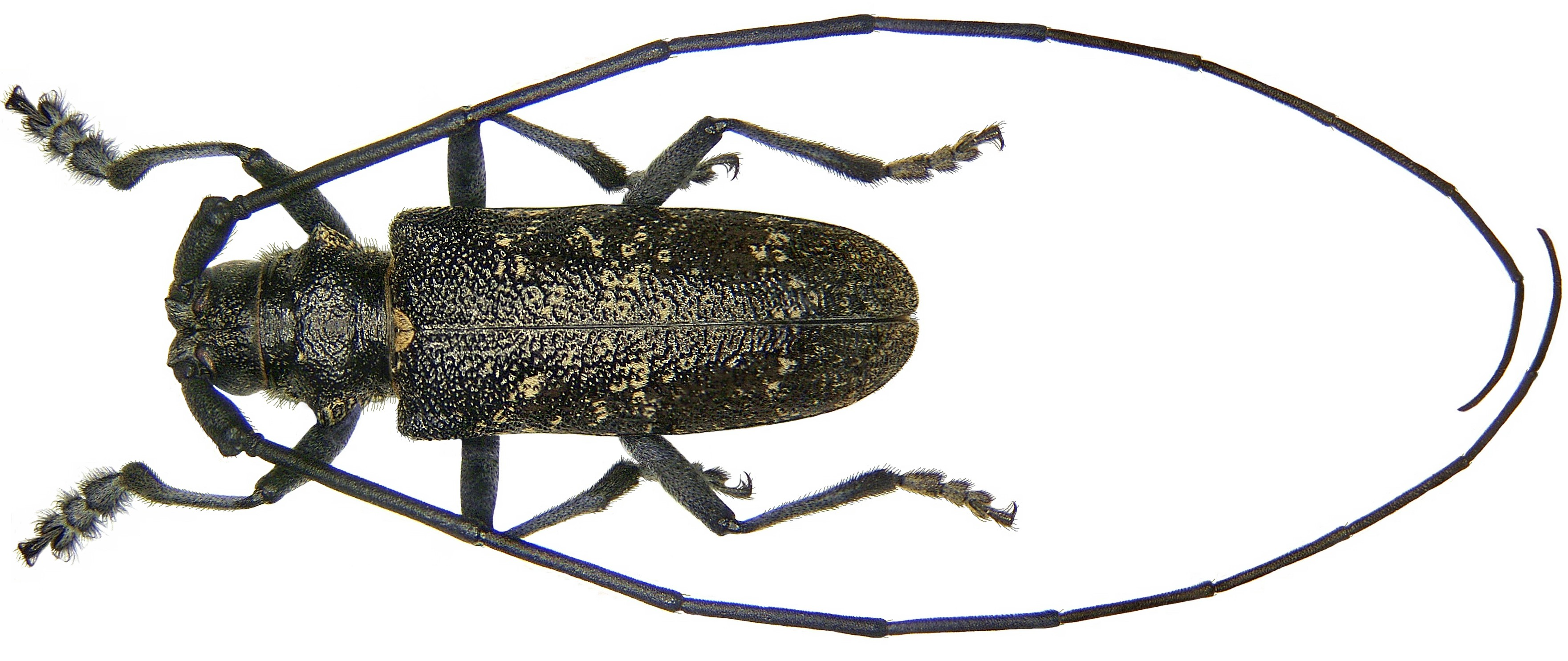 Familie: Cerambycidae Größe: 15-24 mm Verbreitung: Europa Ökologie: Entwicklung in Nadelbäumen Fundort: Austria, Tirol, St. Ulrich a. Pillersee leg.det. U.Schmidt, 2008 Foto: U.Schmidt, 2008